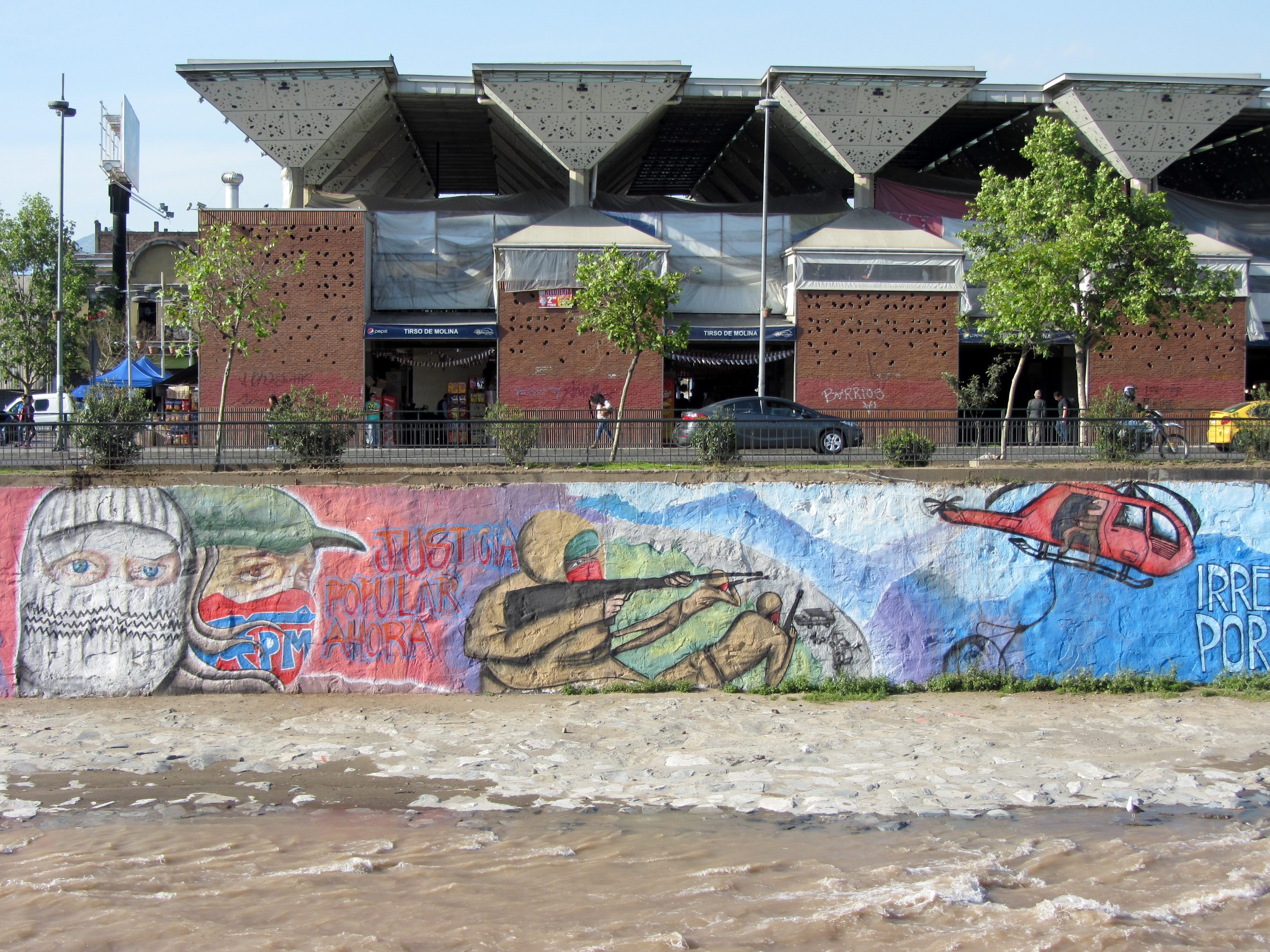 Murales pintados en homenaje al Frente Patriótico Manuel Rodríguez en la ribera norte del río Mapocho, a la altura del mercado de abastos Tirso de Molina, entre el puente de la Paz y el de Los Carros (peatonal).